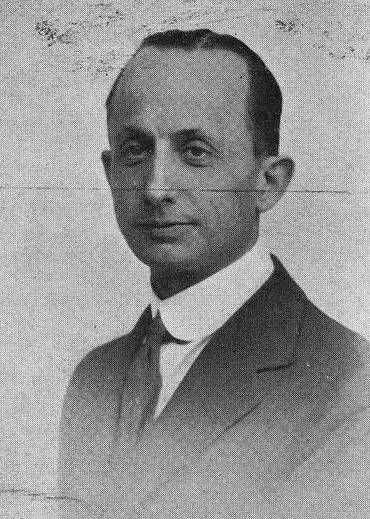 José del Moral Sanjurjo, fotografía en Vida Gallega 1934